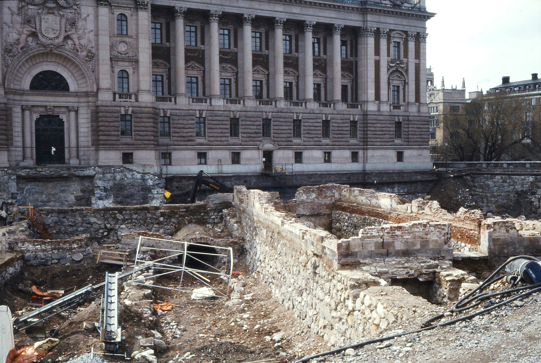 Utgrävningar framför Sveriges Riksdagshus 1978 "Riksgropen".